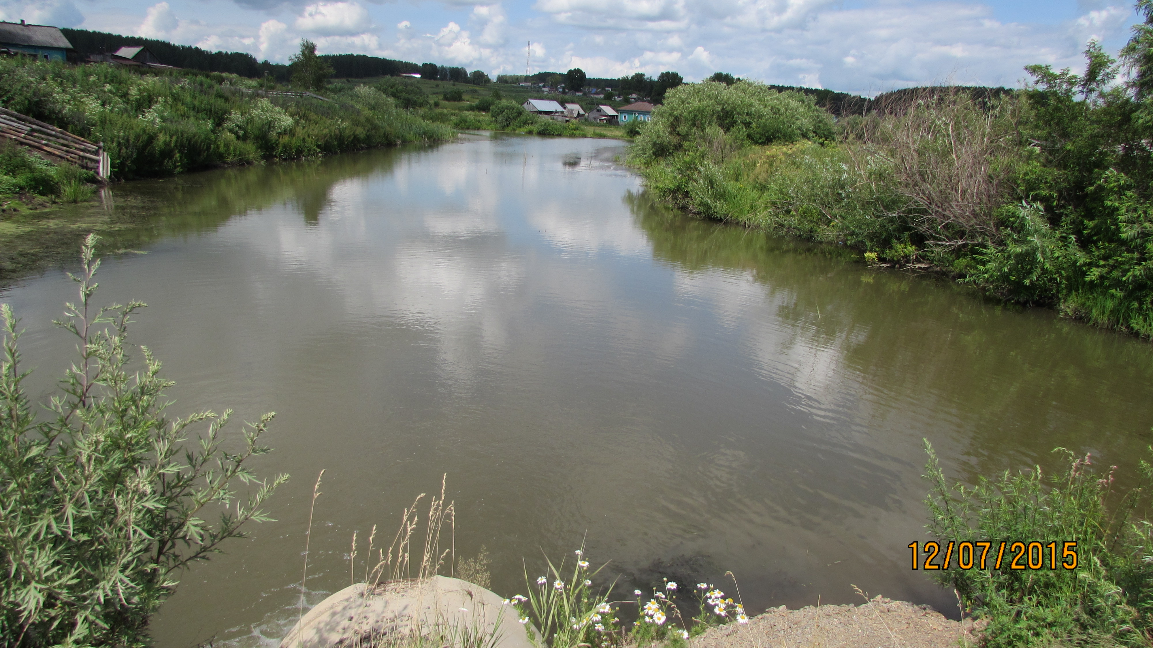 река Каменка